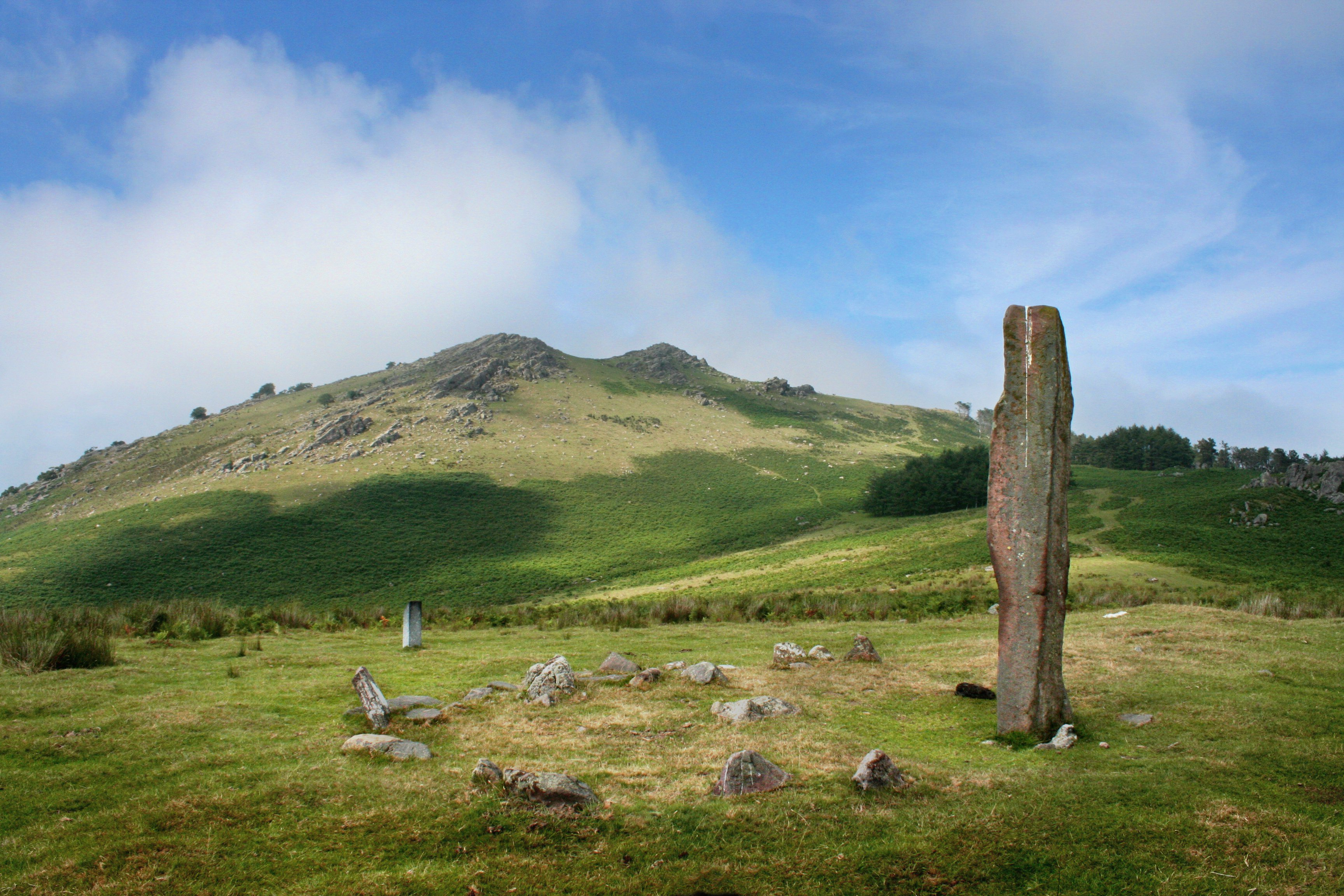 Cromlech y menhir de EtenetaEuskara: Etenetako harrespila eta iruinarria